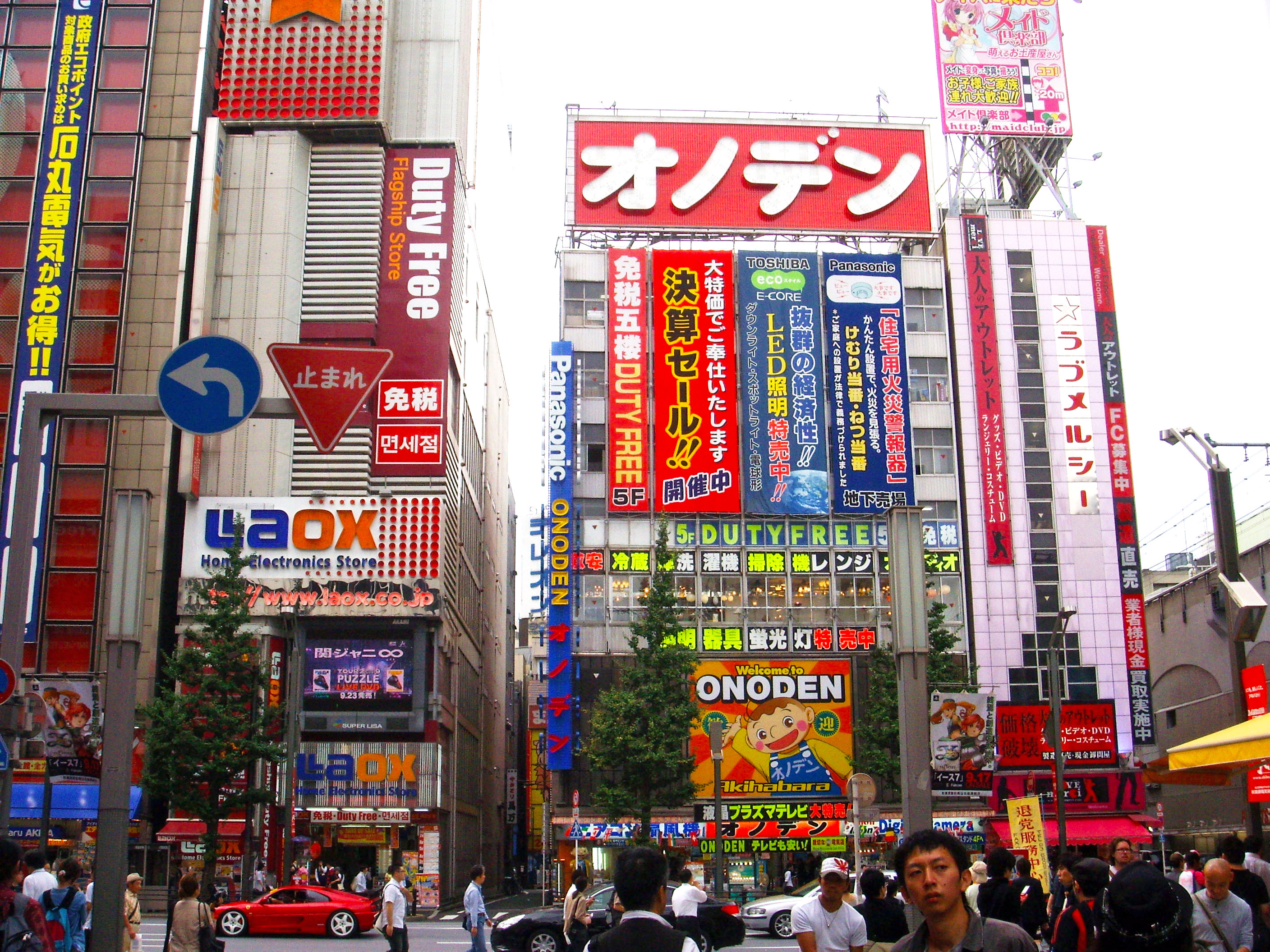 Akihabara, electronics district